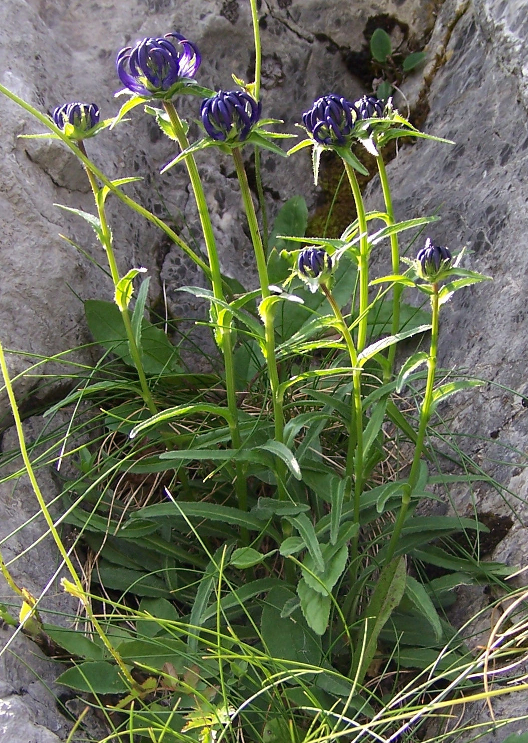 Phyteuma orbiculare (pl. zerwa kulista), habitat: Tatra Mountains, Hala Upłaz